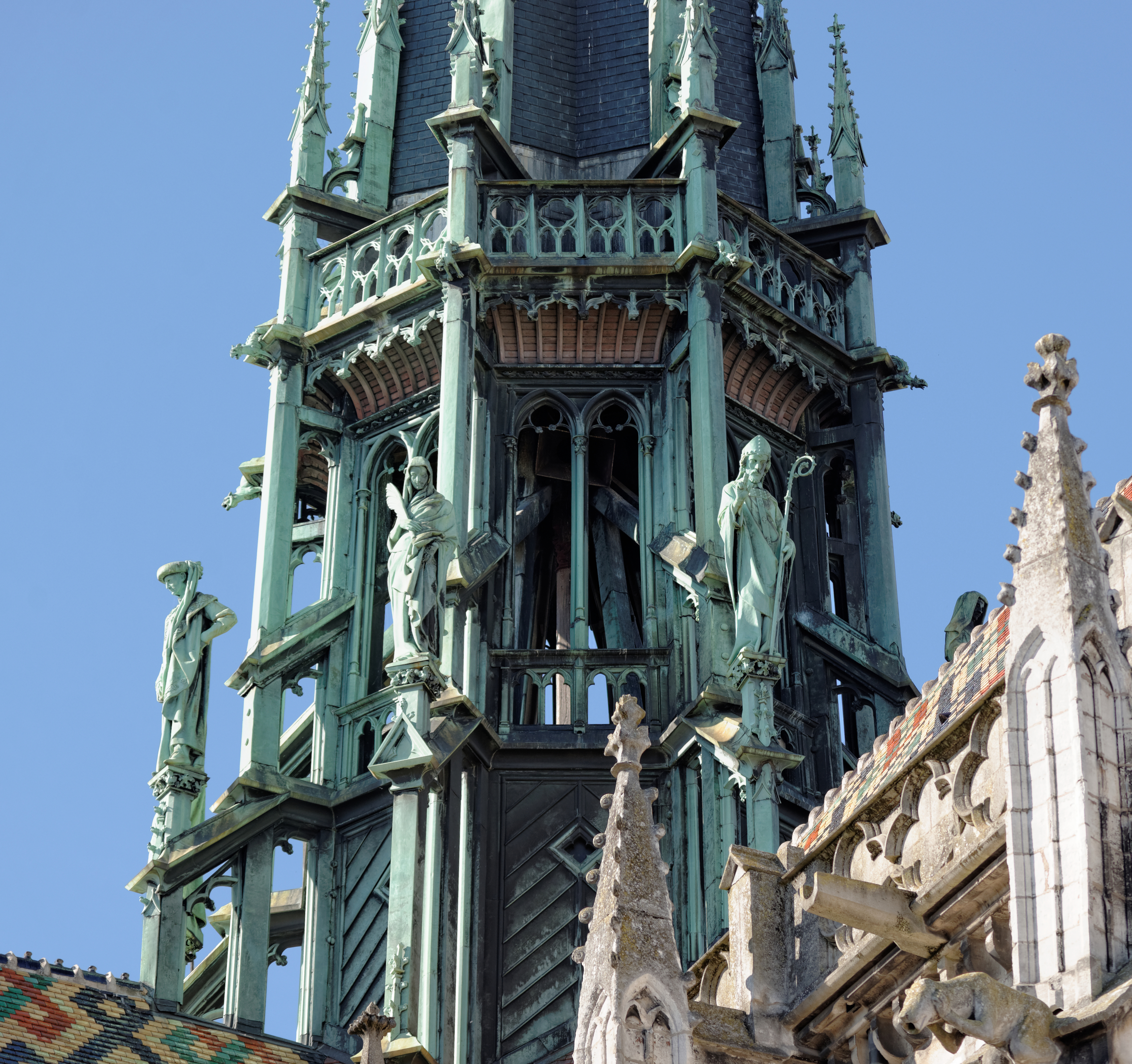 Sculptures entourant la flèche de la Cathédrale Saint-Bénigne de Dijon (Côte d'Or, Bourgogne, France). .